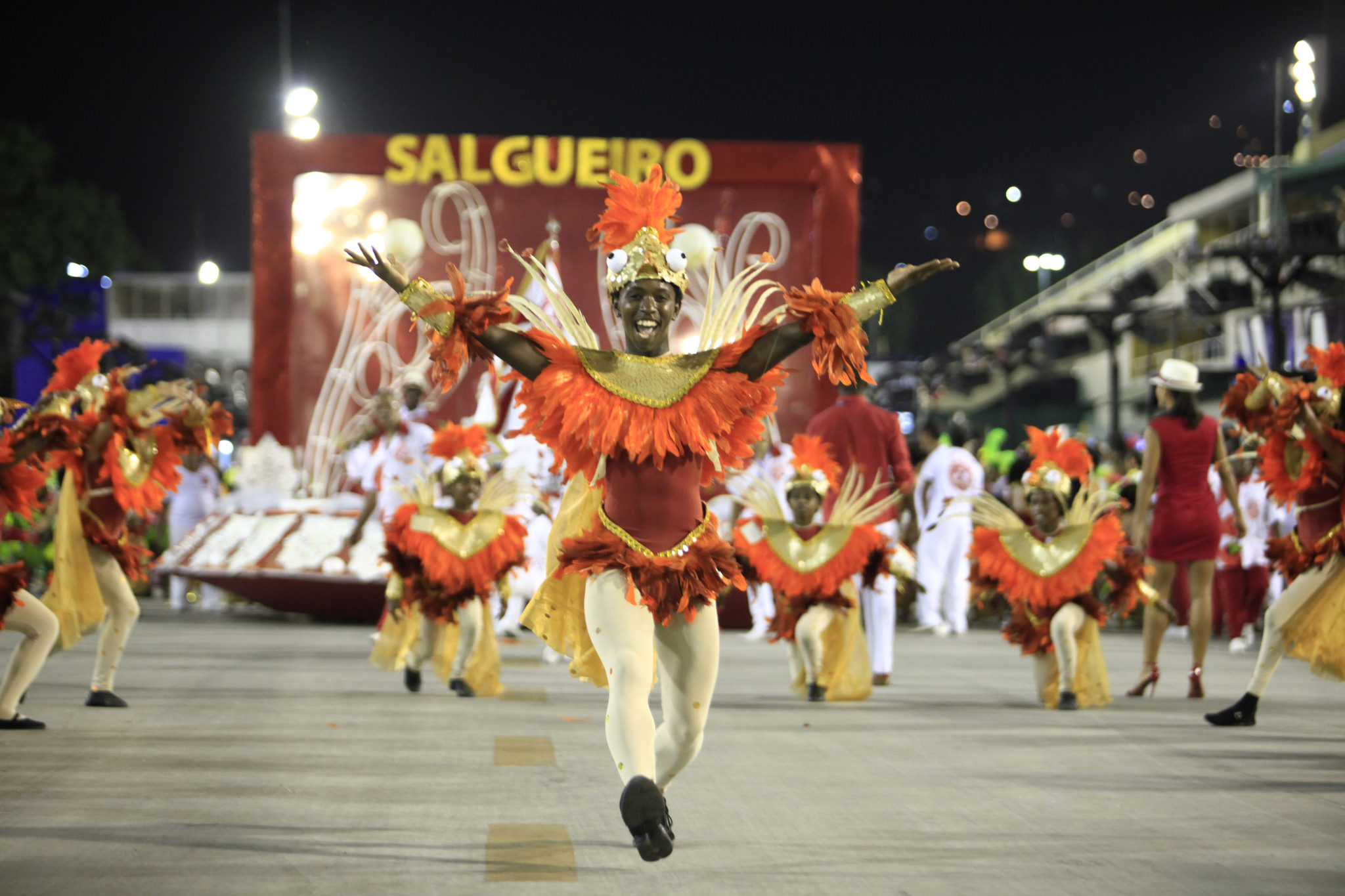 Rio de Janeiro - Pequenos sambistas fecham desfiles na Marquês de Sapucaí.